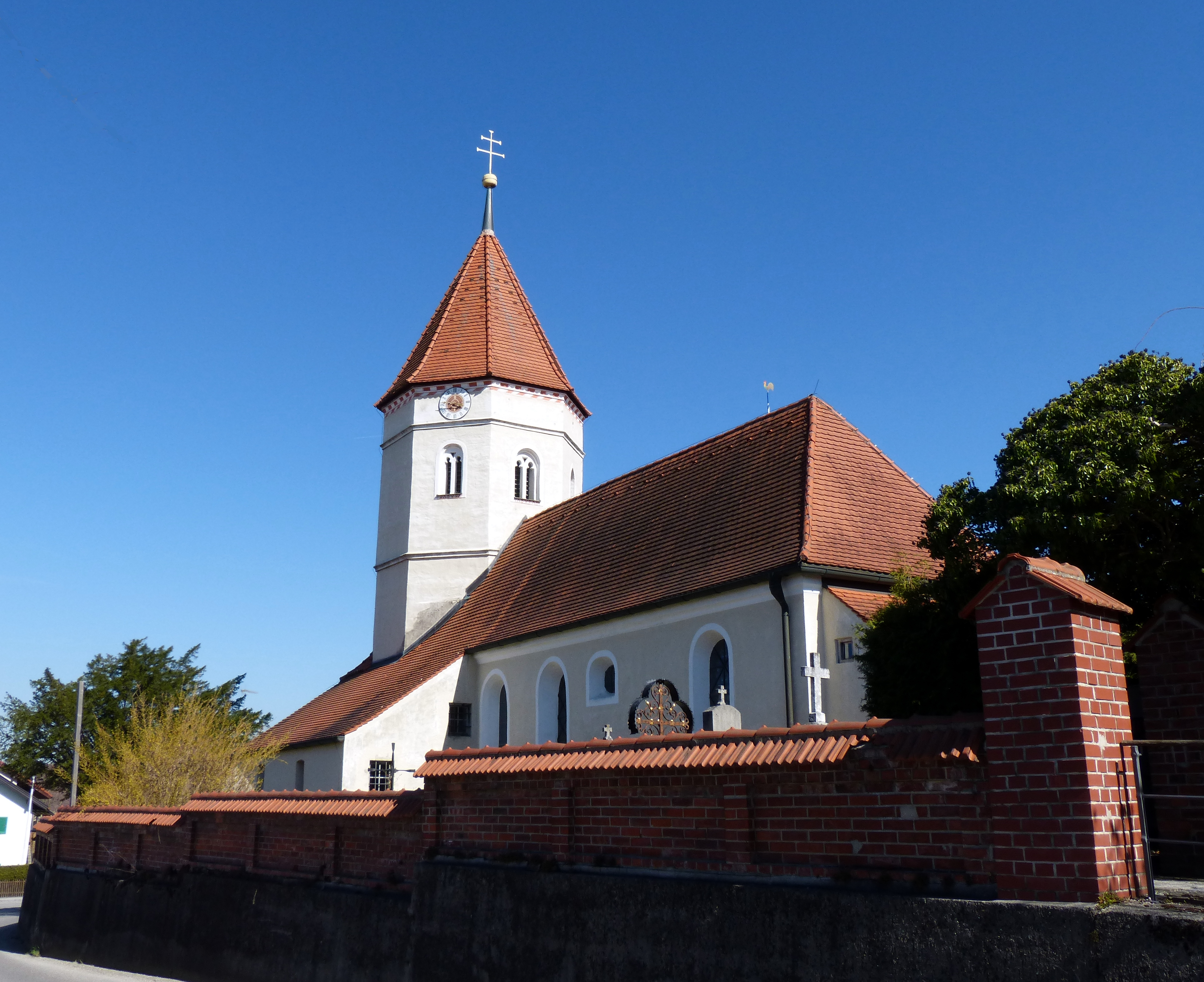 Weßling, OT Oberpfaffenhofen, Kirche St. Georg. Der achteckige Chorturm der alten Oberpfaffenhofener Pfarrkirche stammt aus der Mitte des 15. Jahrhunderts. Das Langhaus wurde während einer grundlegenden Renovierung im 18. Jahrhundert auf der älteren Grundlage neu erbaut. This is a photograph of an architectural monument.